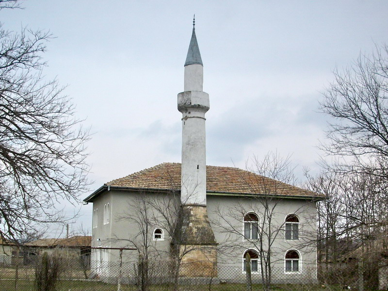 Село Кардам, община Попово. Мюсюлманският храм